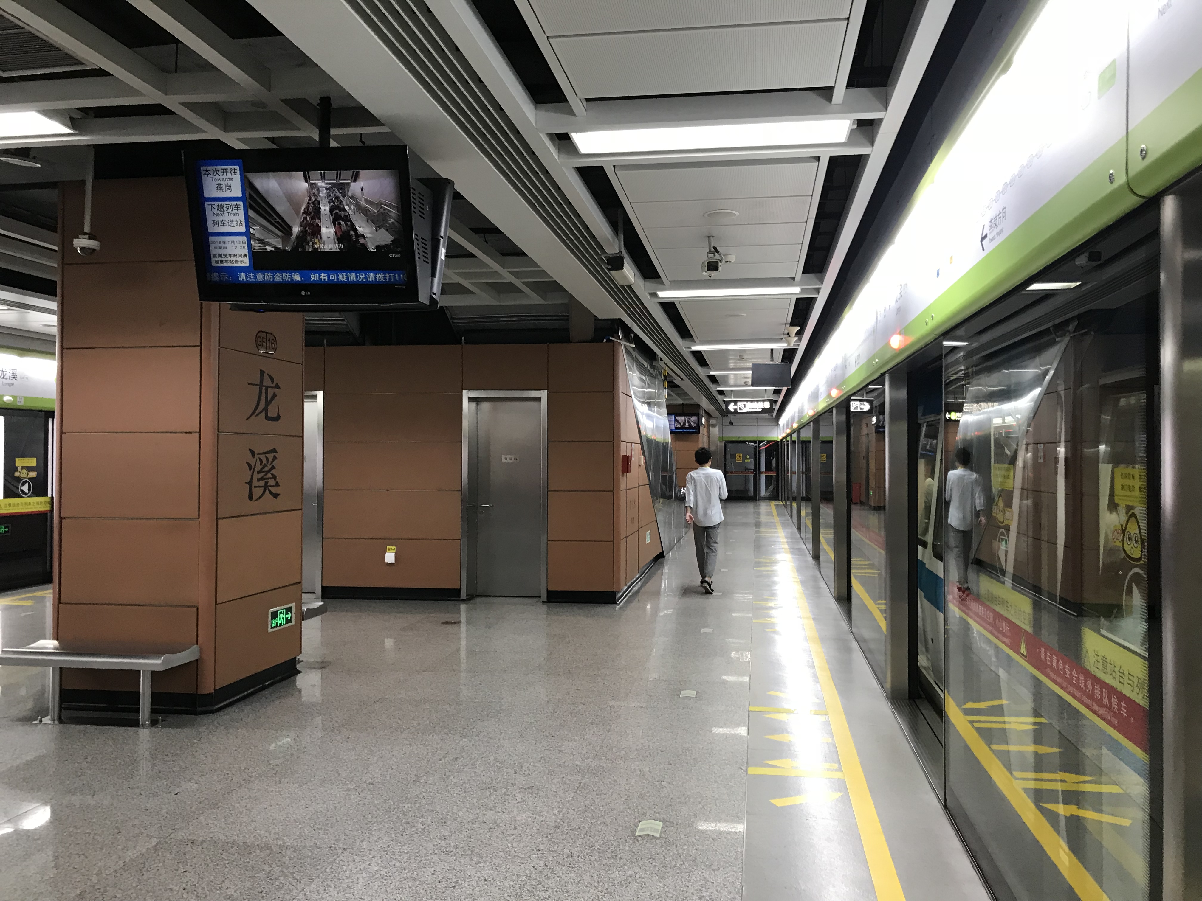 广州地铁龙溪站